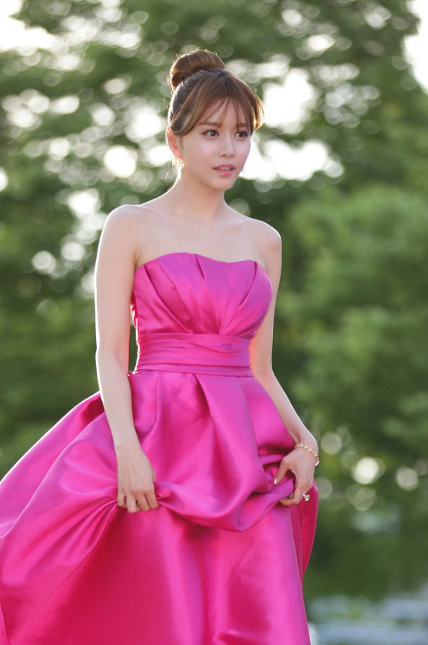 제19회 부천국제판타스틱영화제 레드카펫 part.3